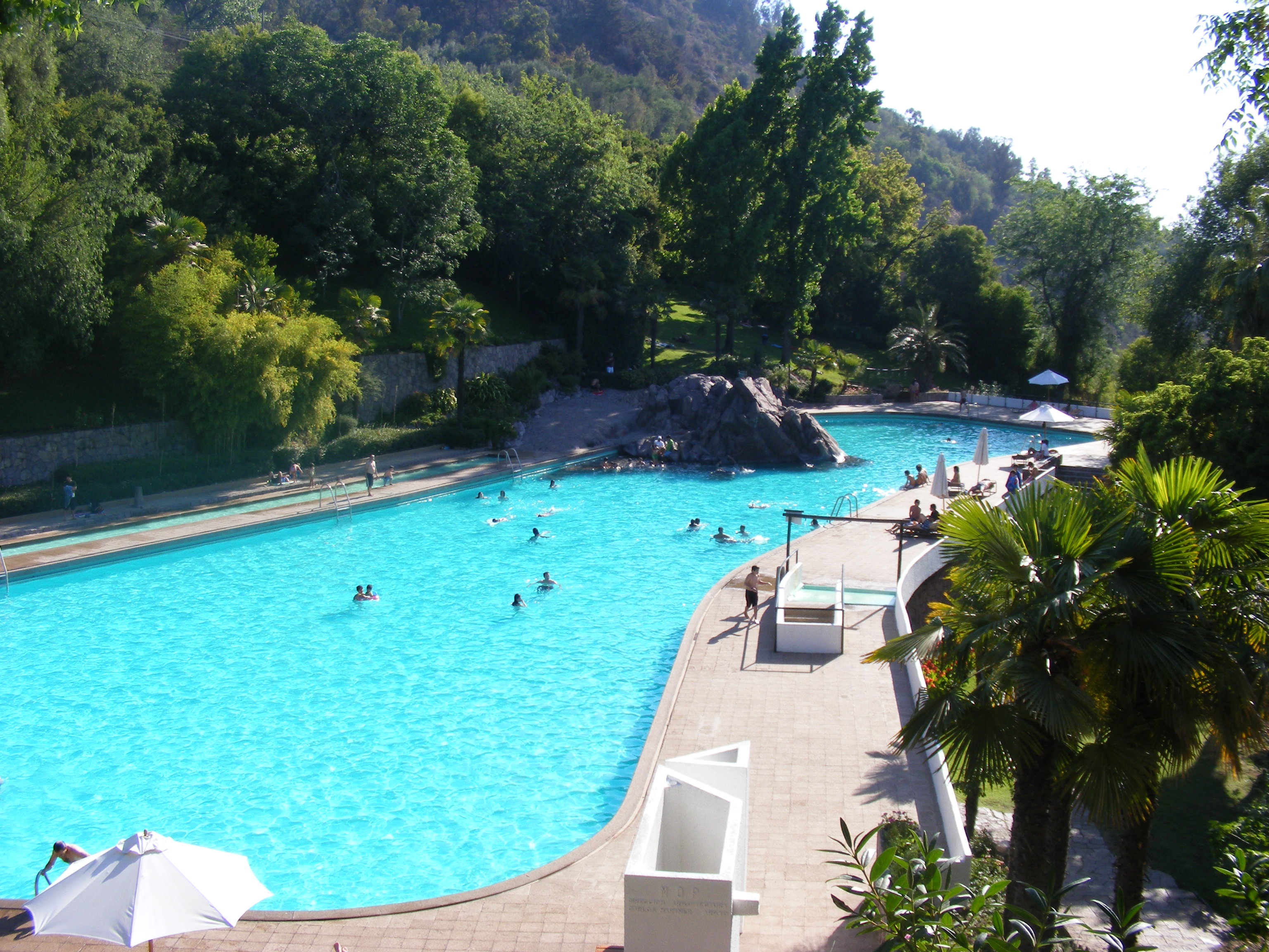 Piscina del Parque Municipal de Santiago Minicipal Park Swimming pool Santiago